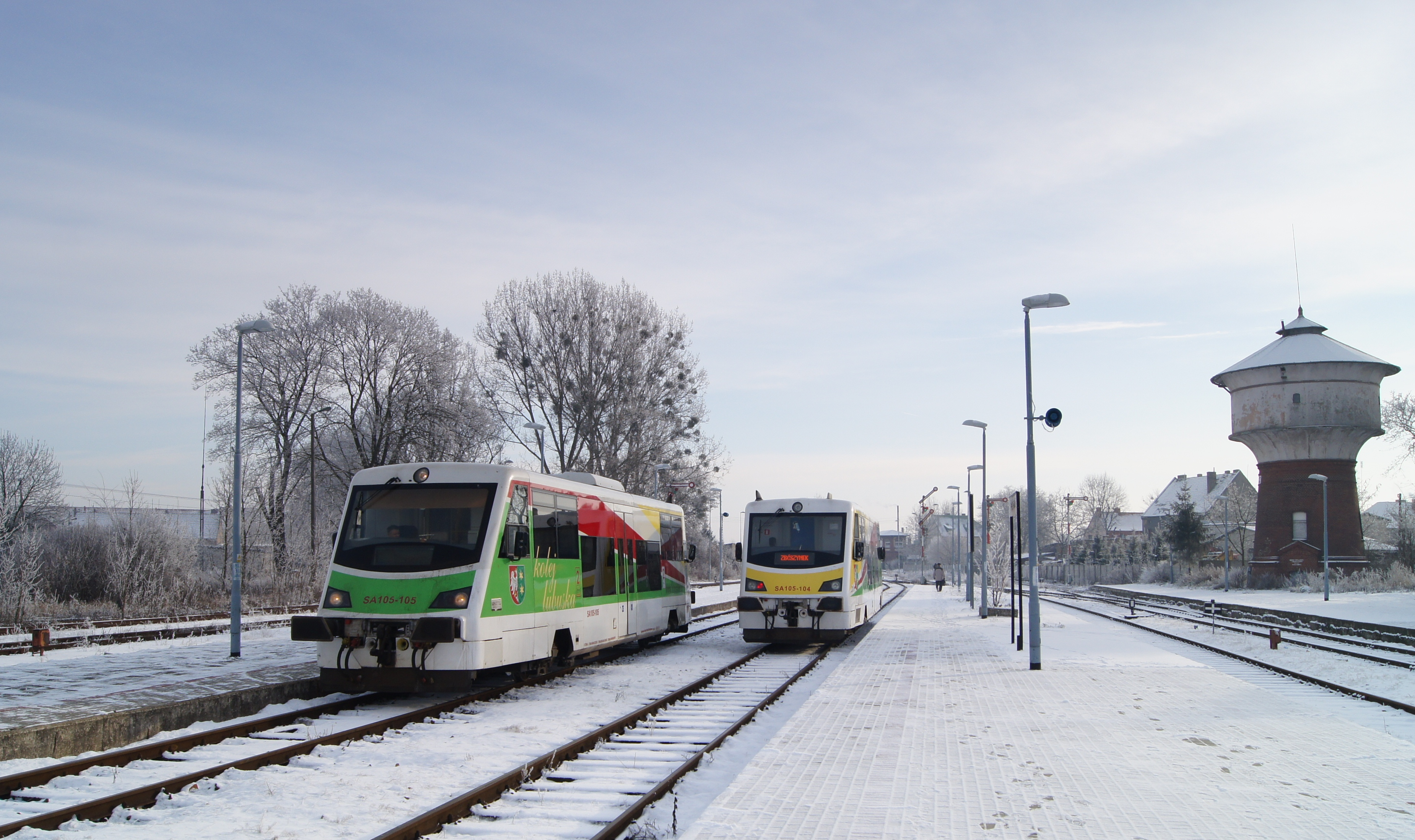 Regio Gorzów - Zbąszynek oraz Regio Międzyrzecz - Rzepin